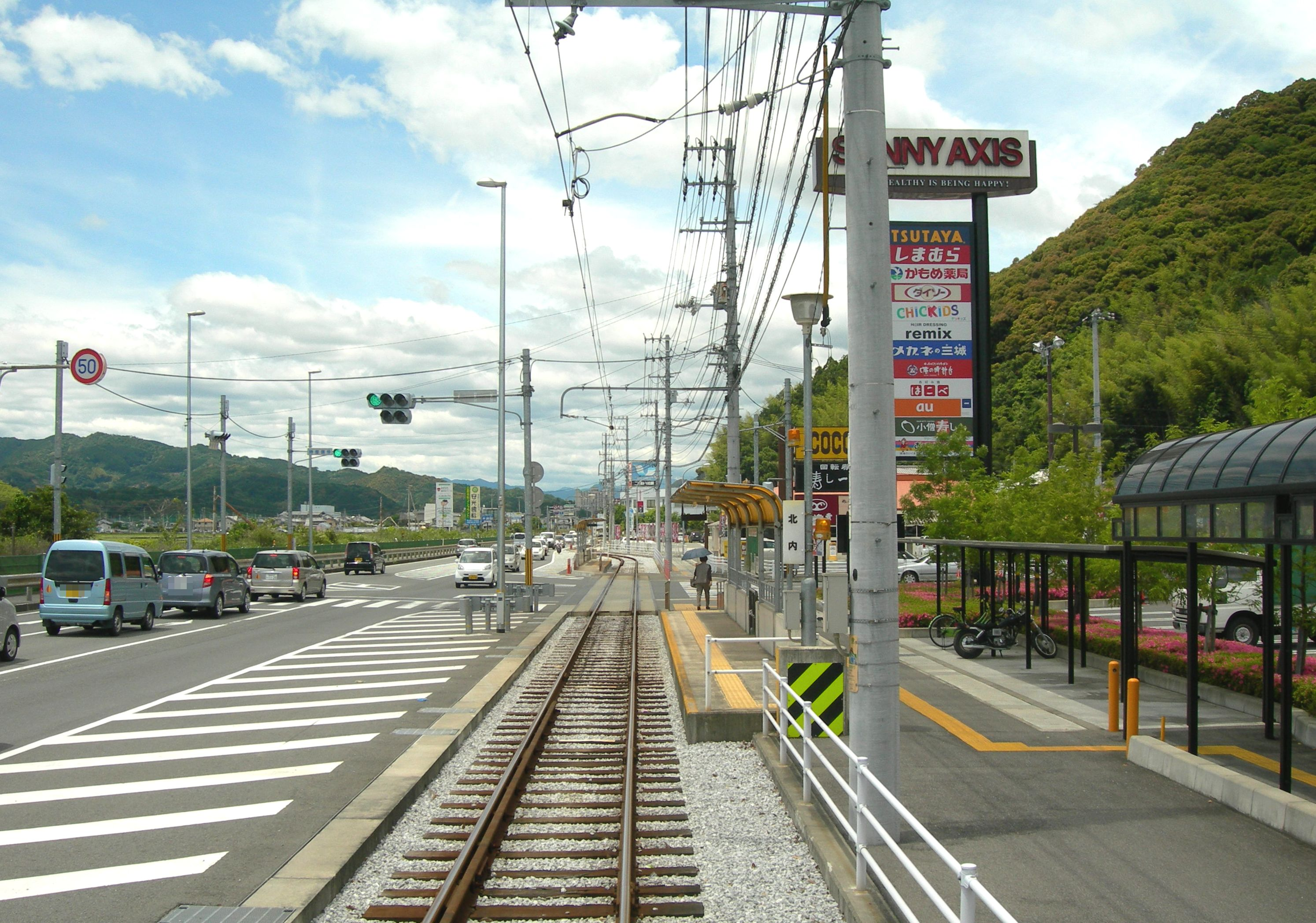 土佐電気鉄道北内電停。